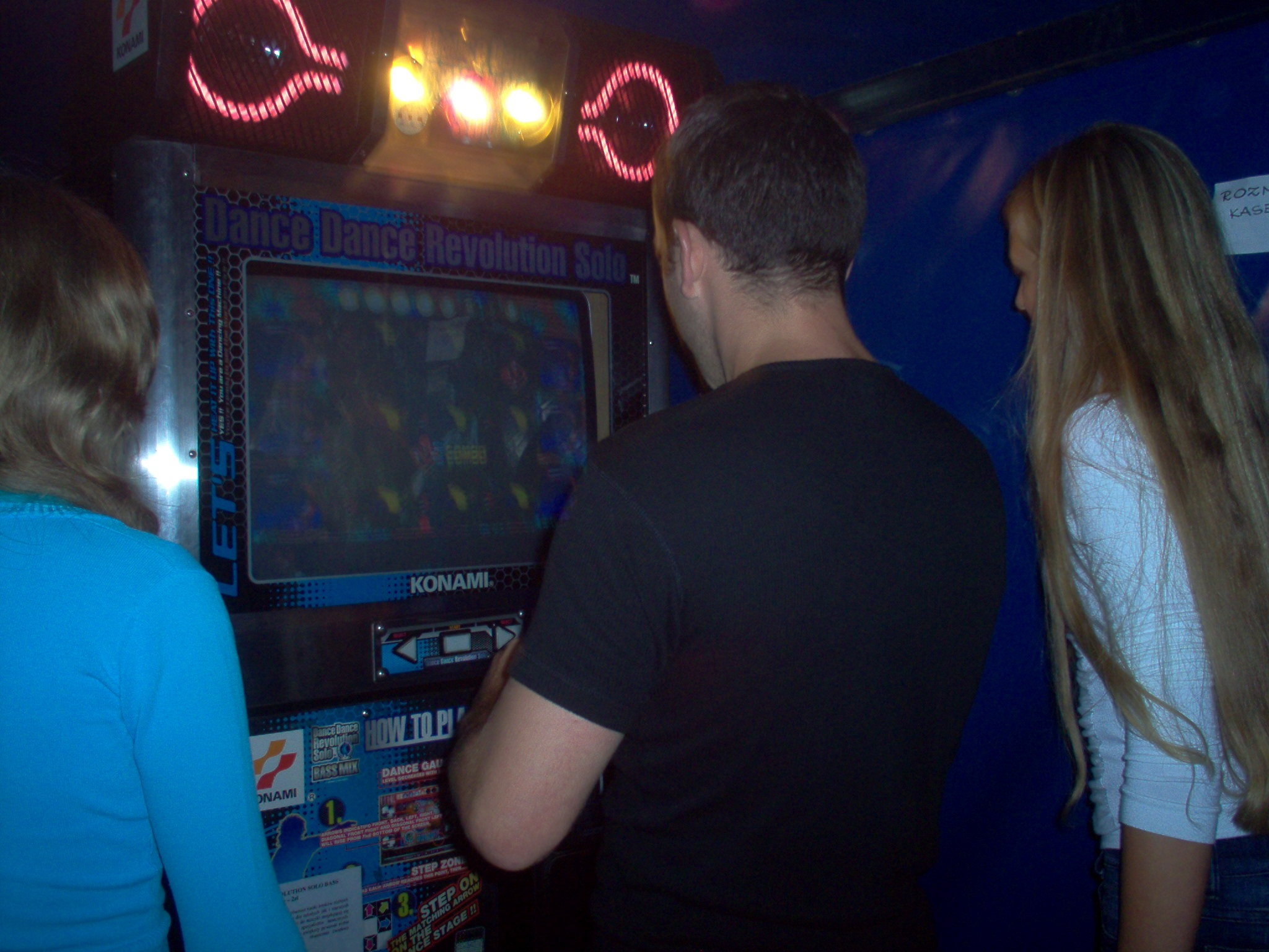 Automat do gry "DDR Solo", zdjęcie zrobione pod koniec 2005 roku w Jastrzębiej Górze.